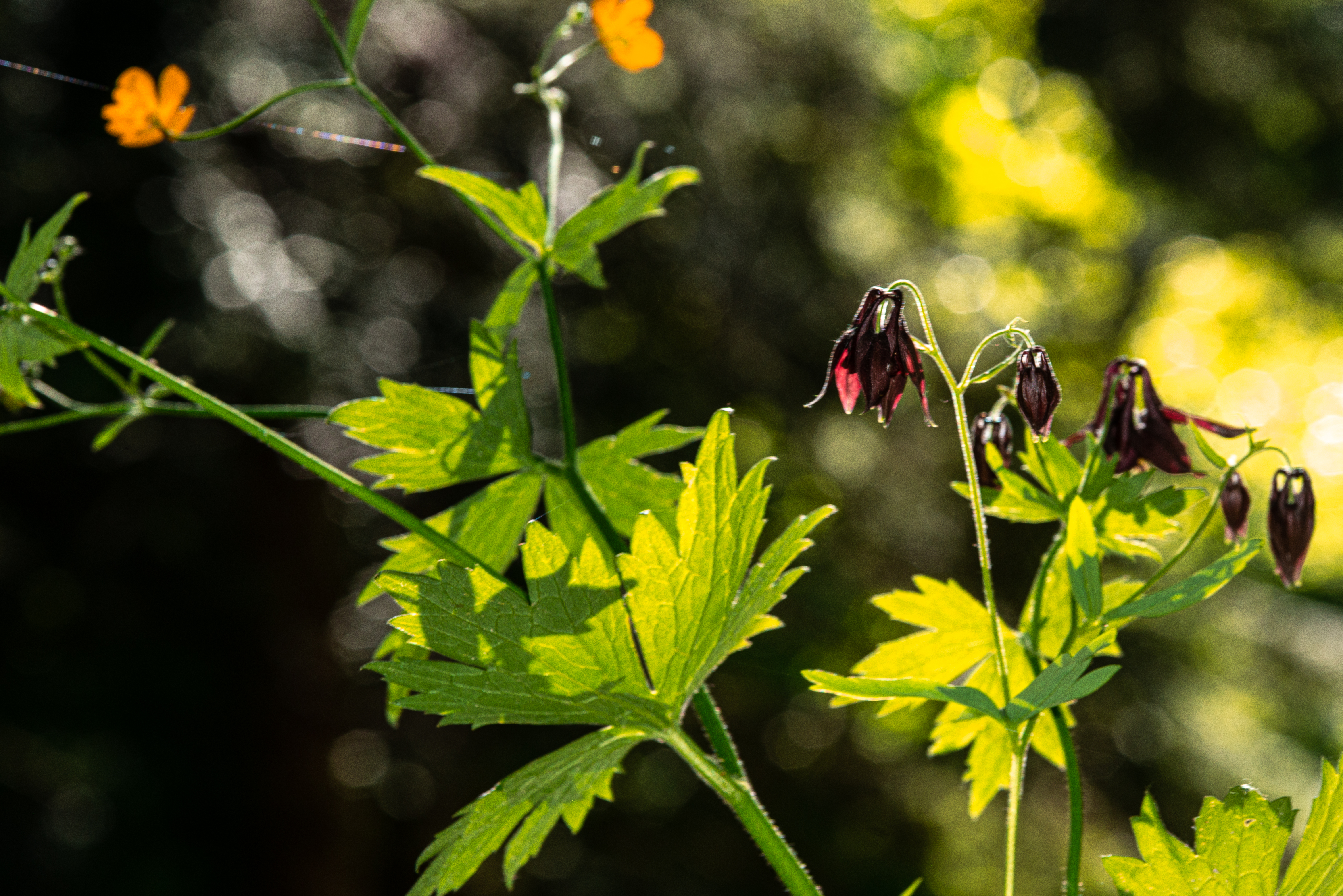 parco naturale della Val Troncea (Q2052058)